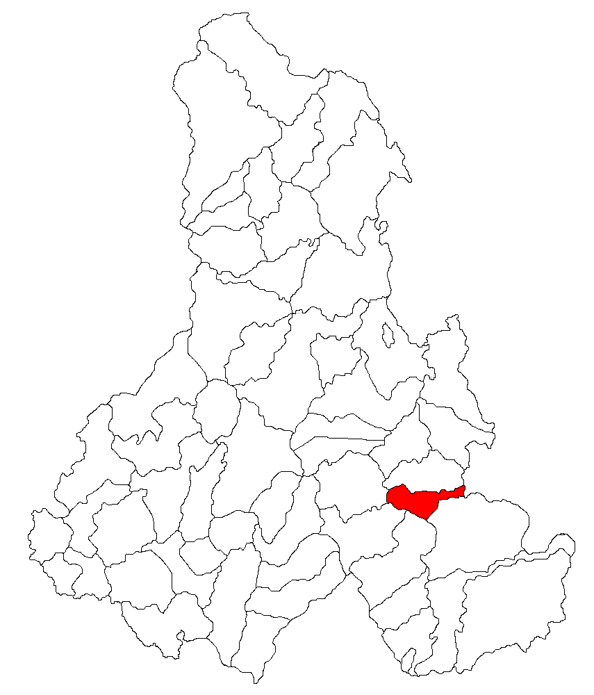 Categorie:Hărţi ale judeţului Harghita Contents 1 Licensing 2 Sursă 3 Licensing 4 Original upload log Licensing Sursă ro::Imagine:Harta_jud_Harghita.png